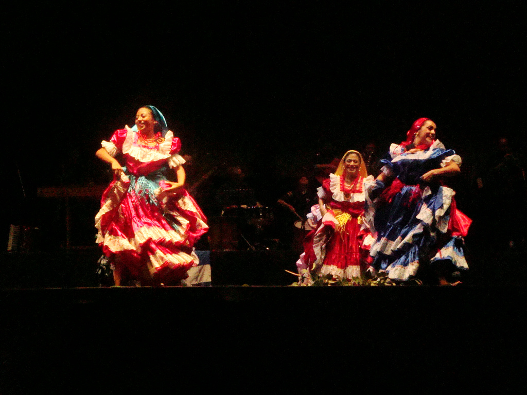 ballet folklorico de El Salvador